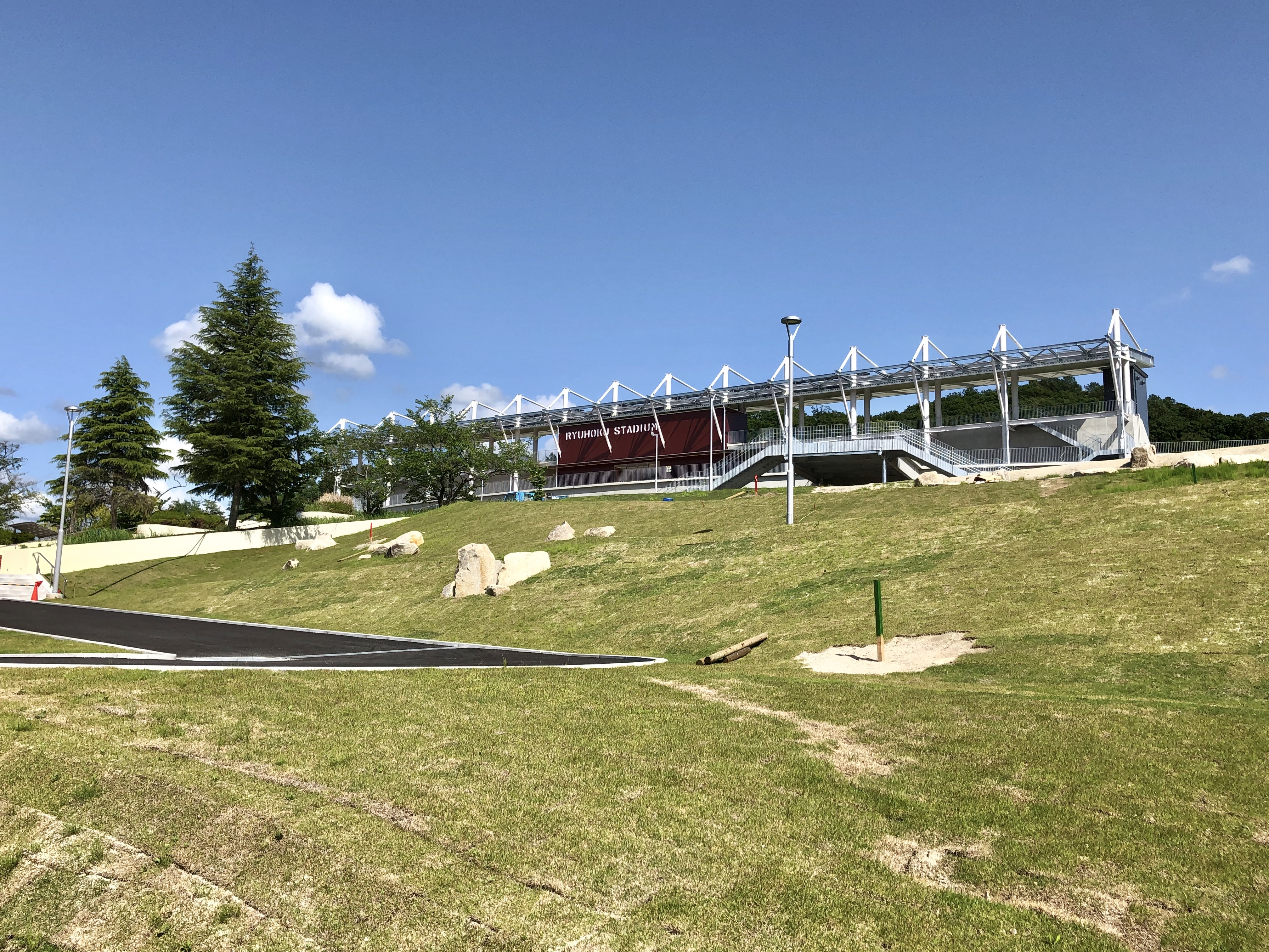 岡崎市龍北総合運動場（岡崎市真伝町）